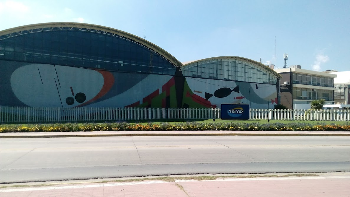 Fachada complejo ARCOR Arroyito sobre ruta nacional 19